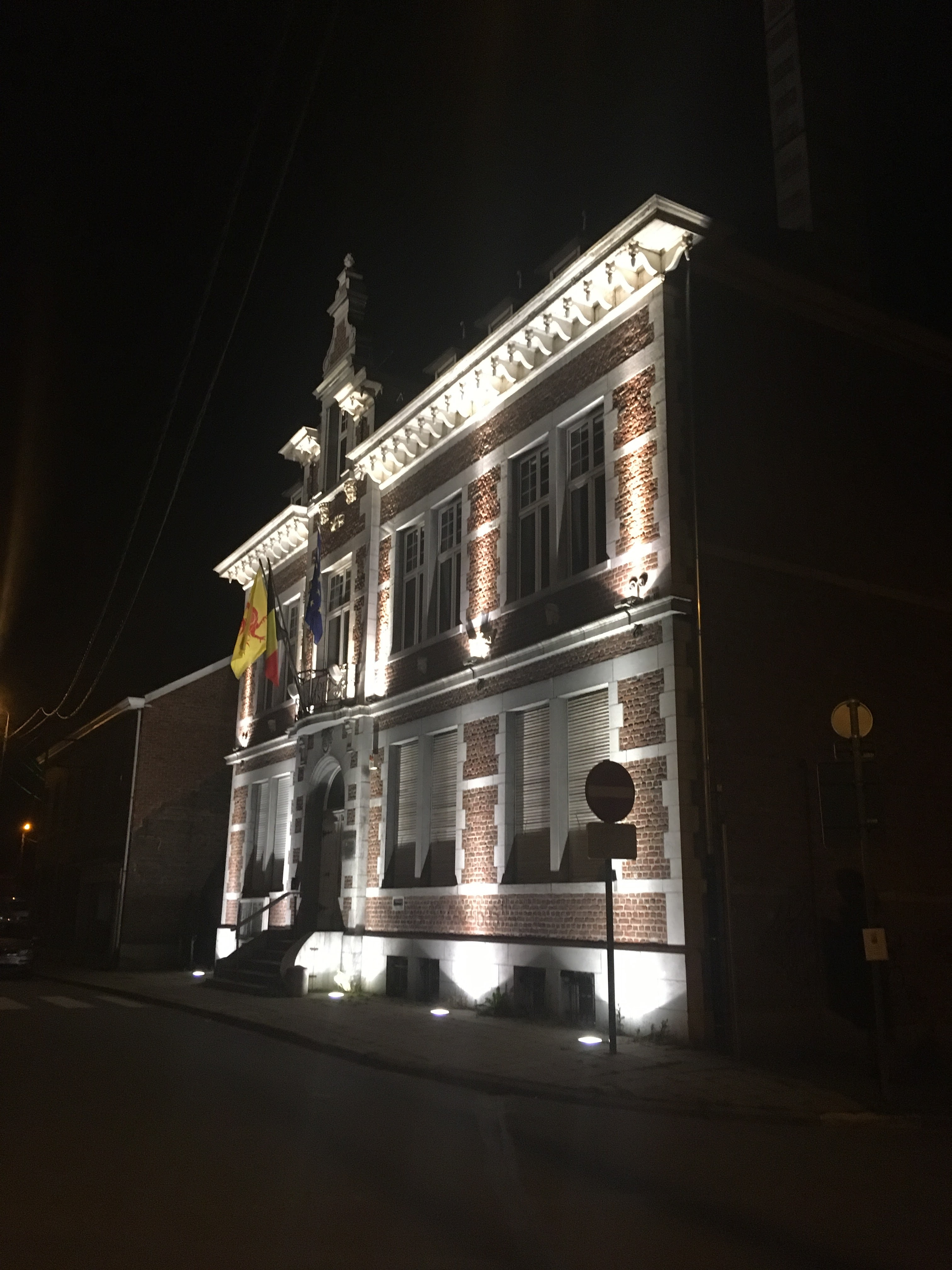 Photo de nuit du bâtiment communal de Vottem comprenant le Musée de la Fraise et de la vie d'antan, la Zone de Police de Herstal et la maison communal.